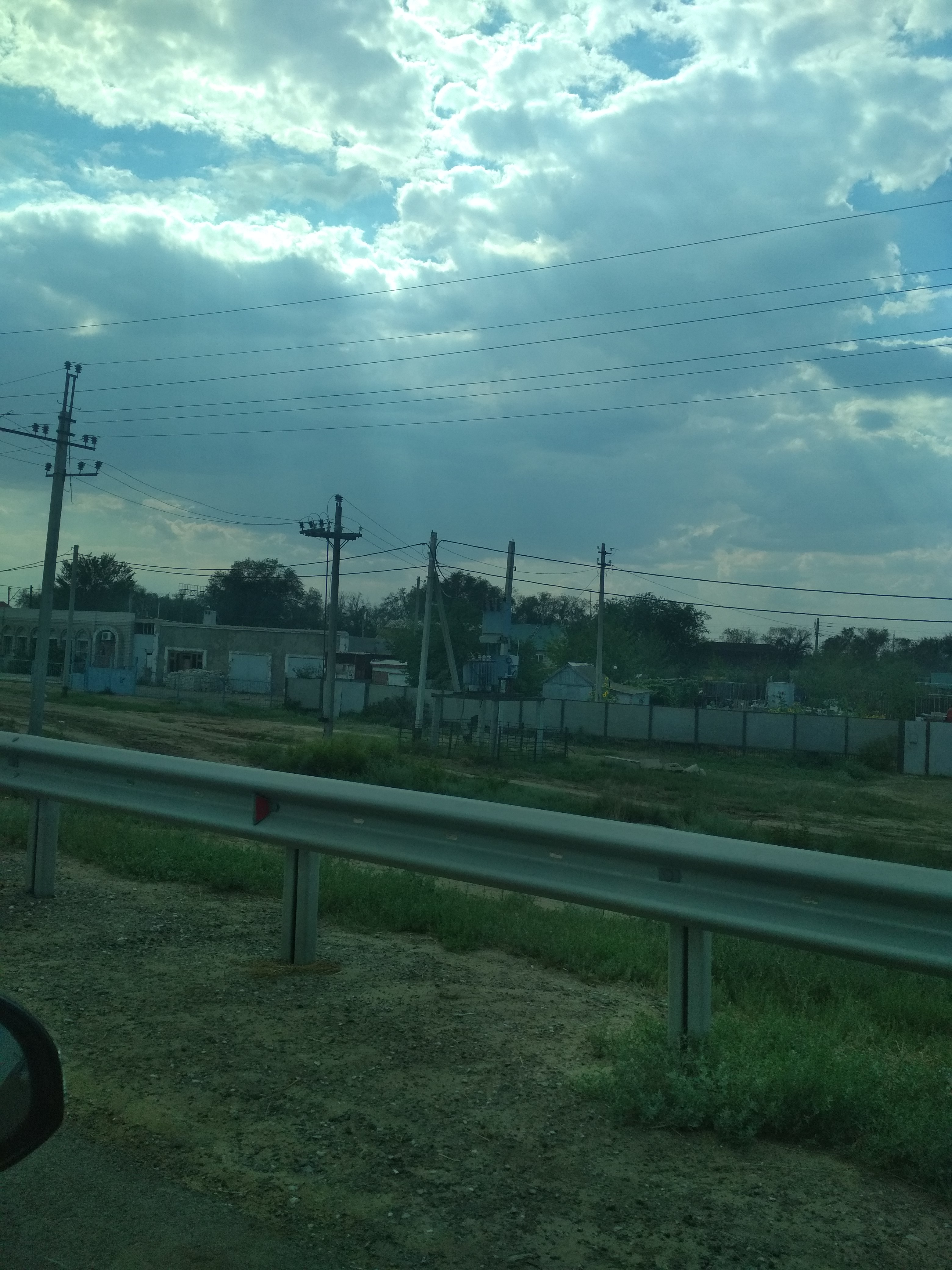 Нохчийн: Рычанский